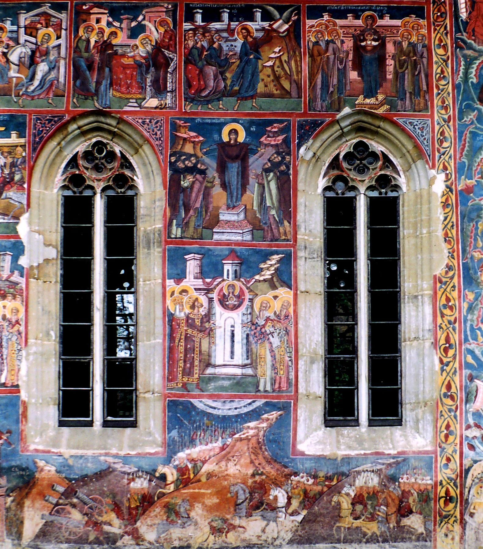 Voronet, Románia: templom, külső freskórészlet